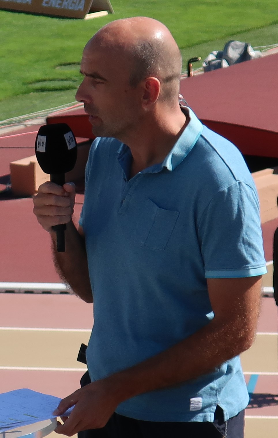 Jarkko Finni Ylen kommentaattorina Kalevan kisoissa 2020.